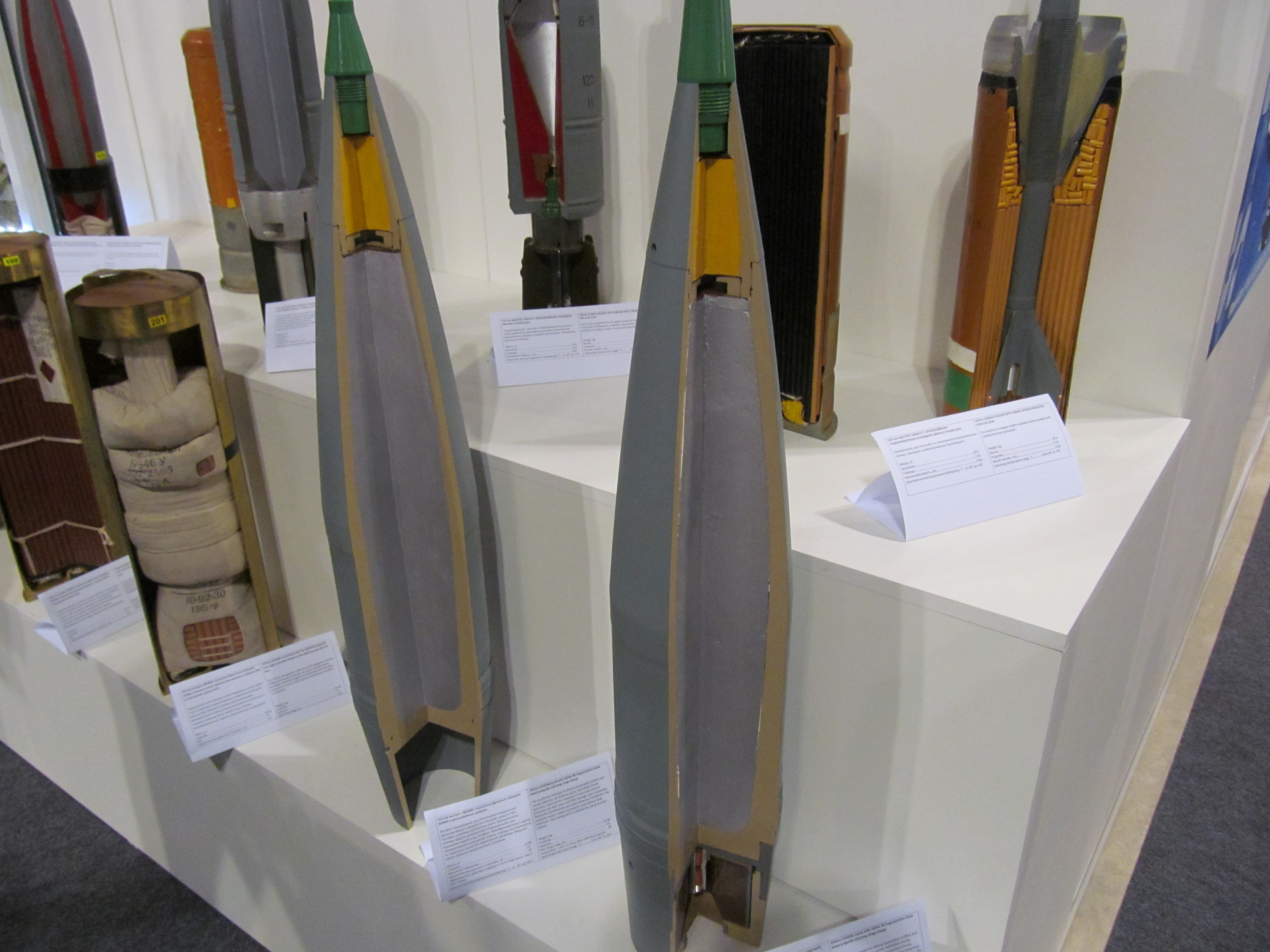 Слева-направо: полный заряд 54-ЖН-546, уменьшенный переменный заряд 54-Ж-546У, 152-мм снаряд 3ОФ64, 152-мм снаряд 3ОФ61.